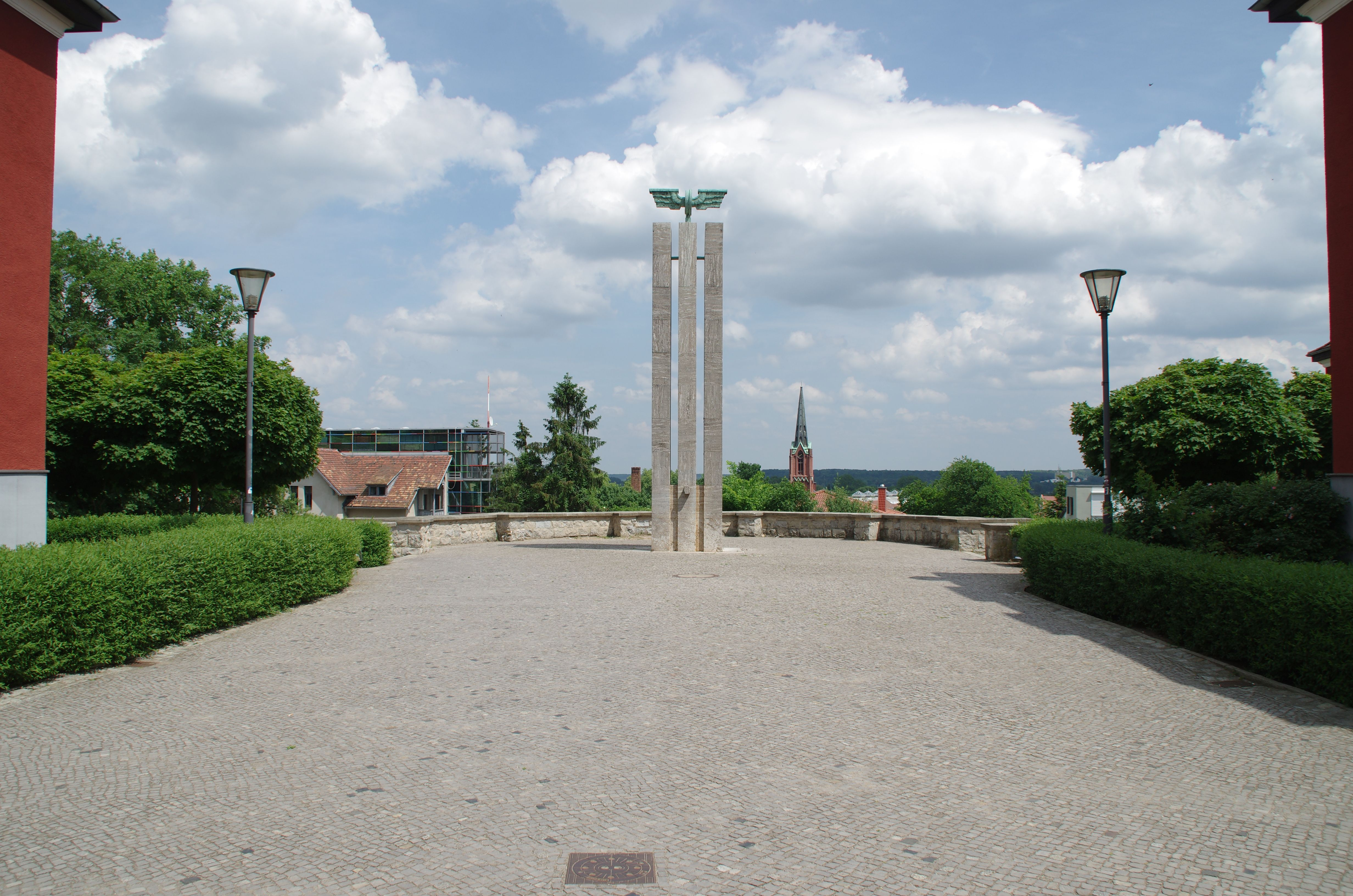 Frankfurt/Oder in Brandenburg. Das Denkmal für Gefallene Eisenbahner befindet sich in der Nähe des Bahnhofes und steht unter Denkmalschutz.